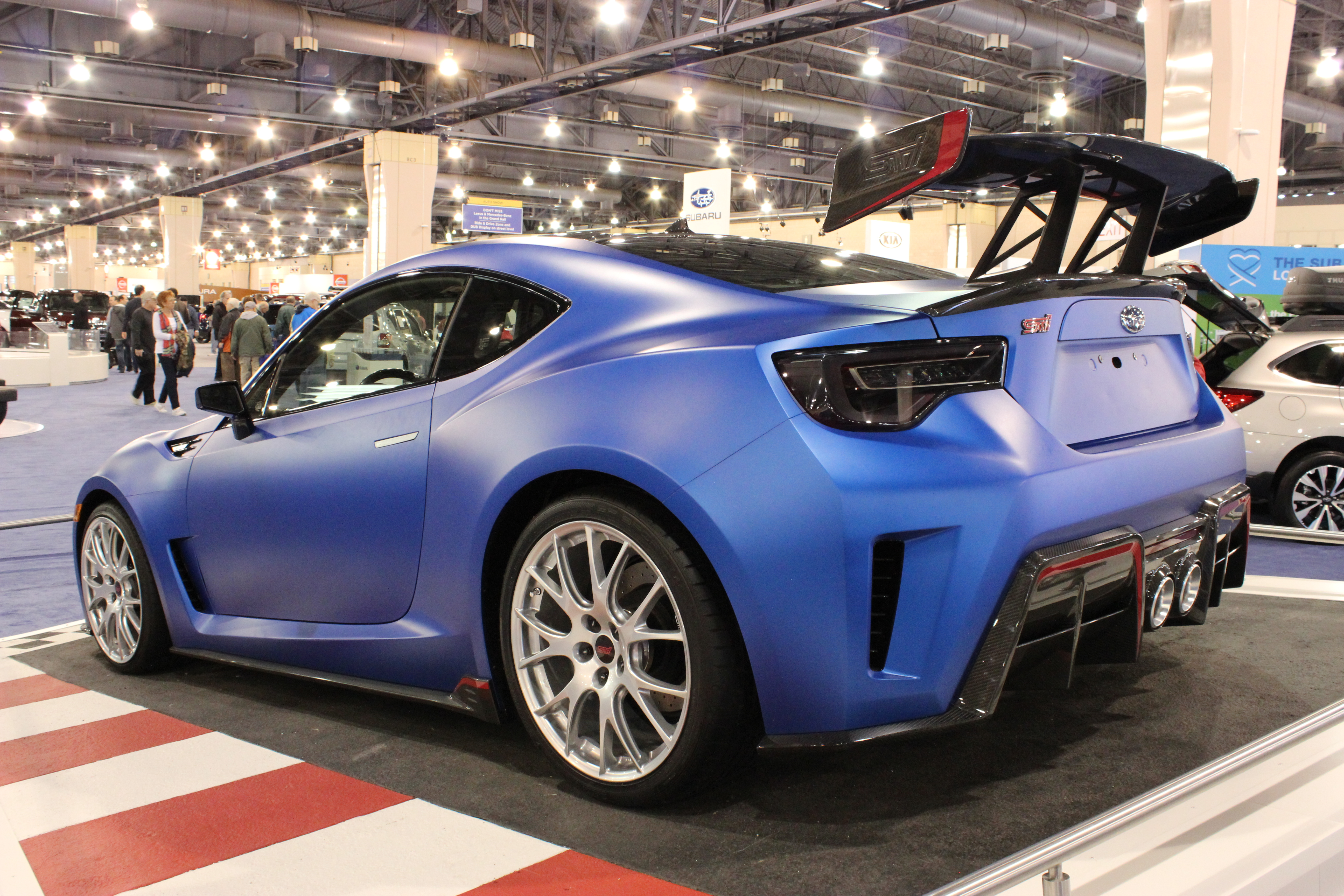 Subaru BRZ STI Performance Concept